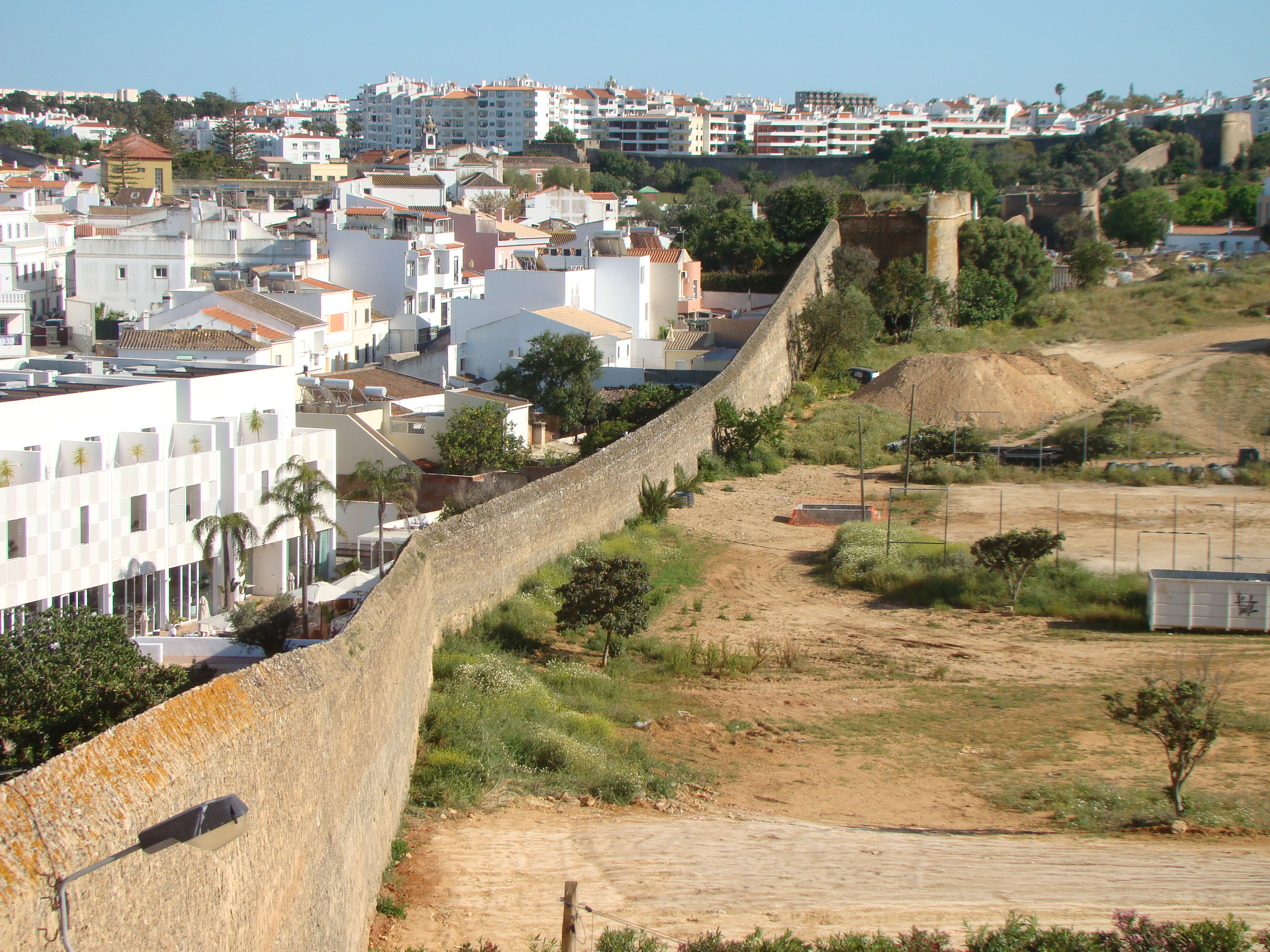 Vista das muralhas de Lagos, Algarve - 16-05-2018